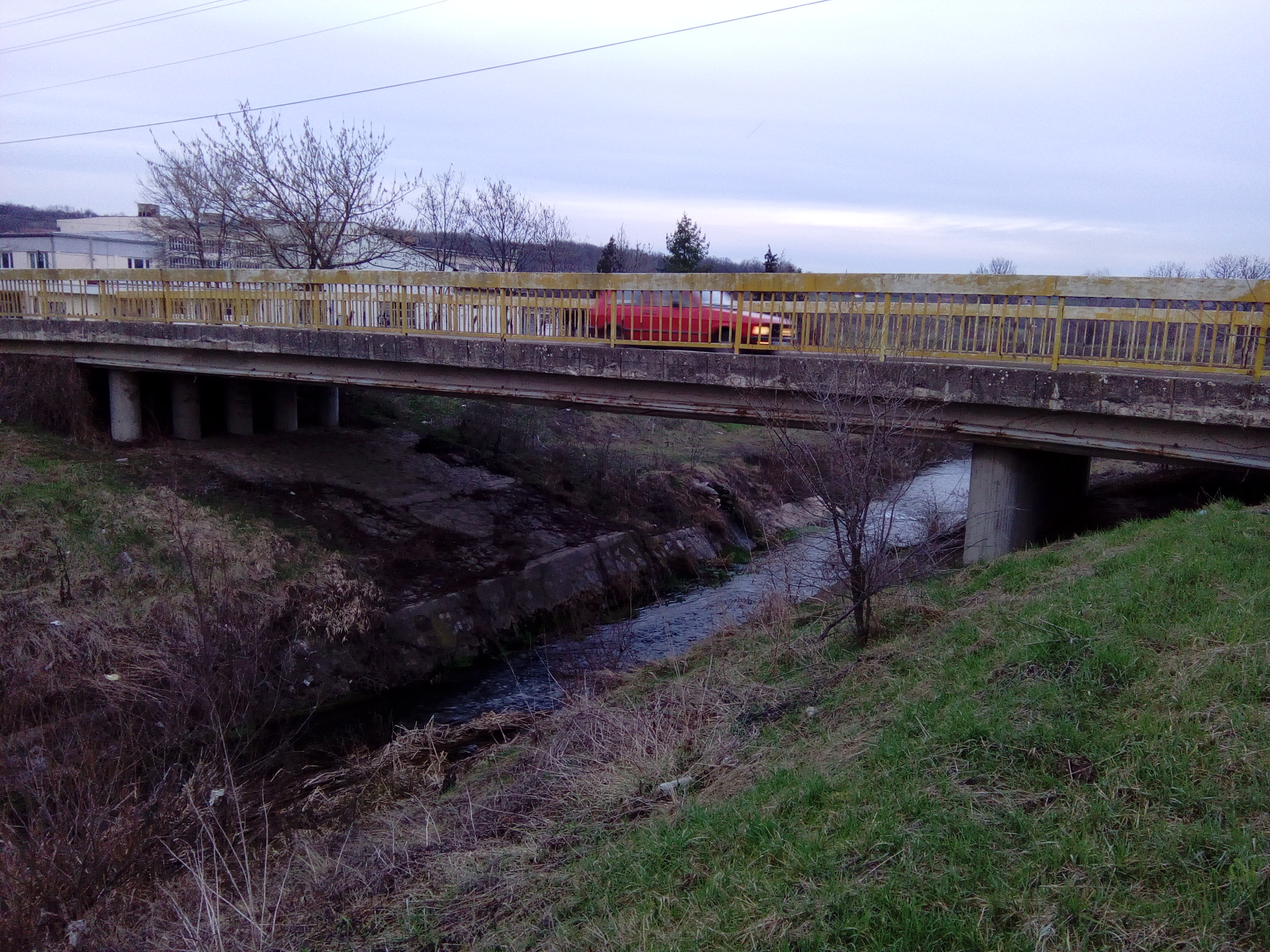 Srpski (latinica): Reka Rača kod Rače